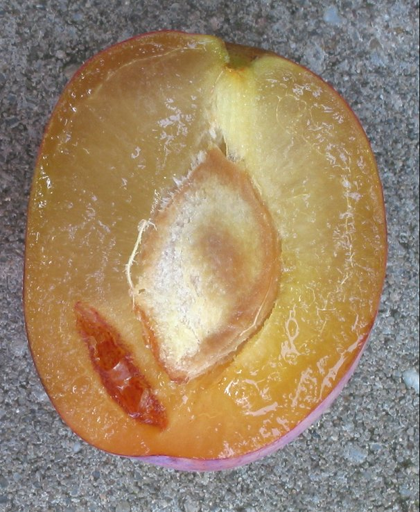 zelfgemaakte foto van in lengte doorgesneden pruim Reine Victoria; begin september